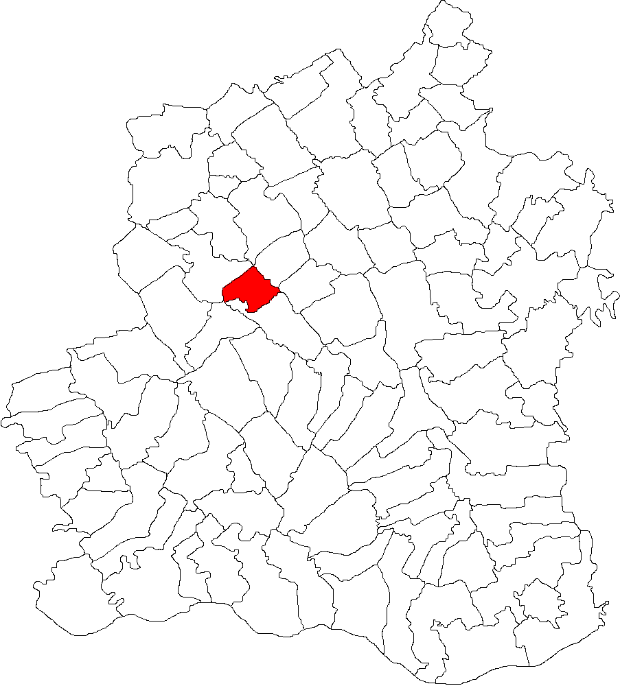 Categorie:Hărţi ale judeţului Teleorman